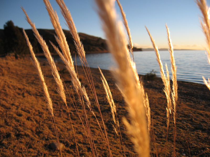 Vista del Lago Titicaca